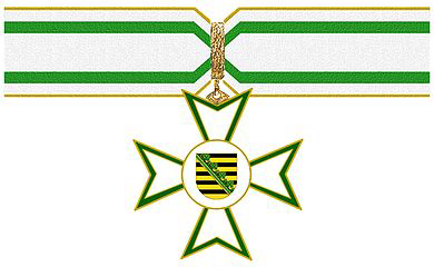 Der Sächsischer Verdienstorden - Avers